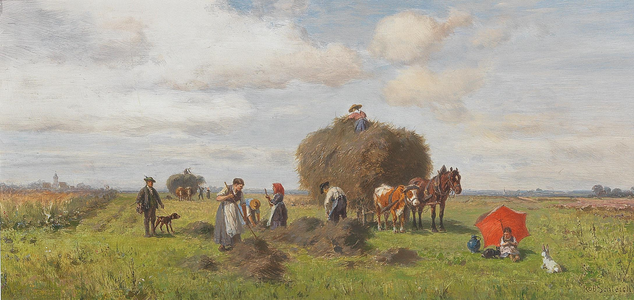 Der rote Sonnenschirm, signiert Rob. Schleich, Öl auf Holz, 11 x 24 cm, Provenienz: Galerie Heinemann, München, Nr. 10545,1910-1912; 1912 Ankauf F. Krohn, Hamburg; Privatsammlung Österreich.